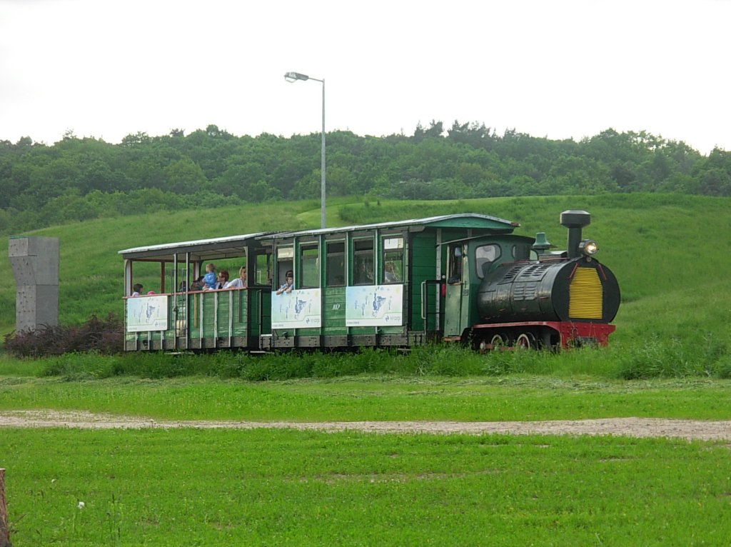 Myślęcinek - kolejka parkowa